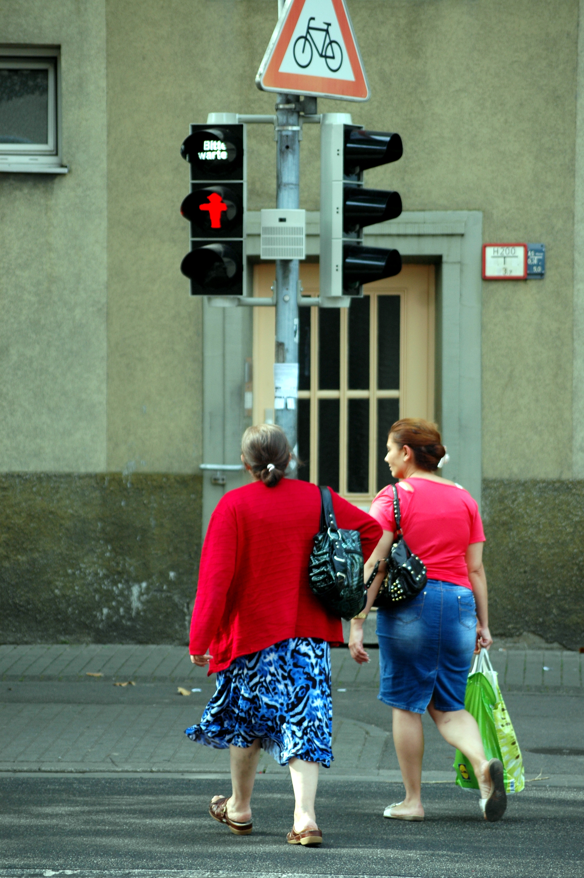 Heidelberg, Rottmannstrasse, Ampelmännchen